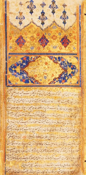 Rüstəm Cürcani. “Zəxireyi-Nizamşahi”